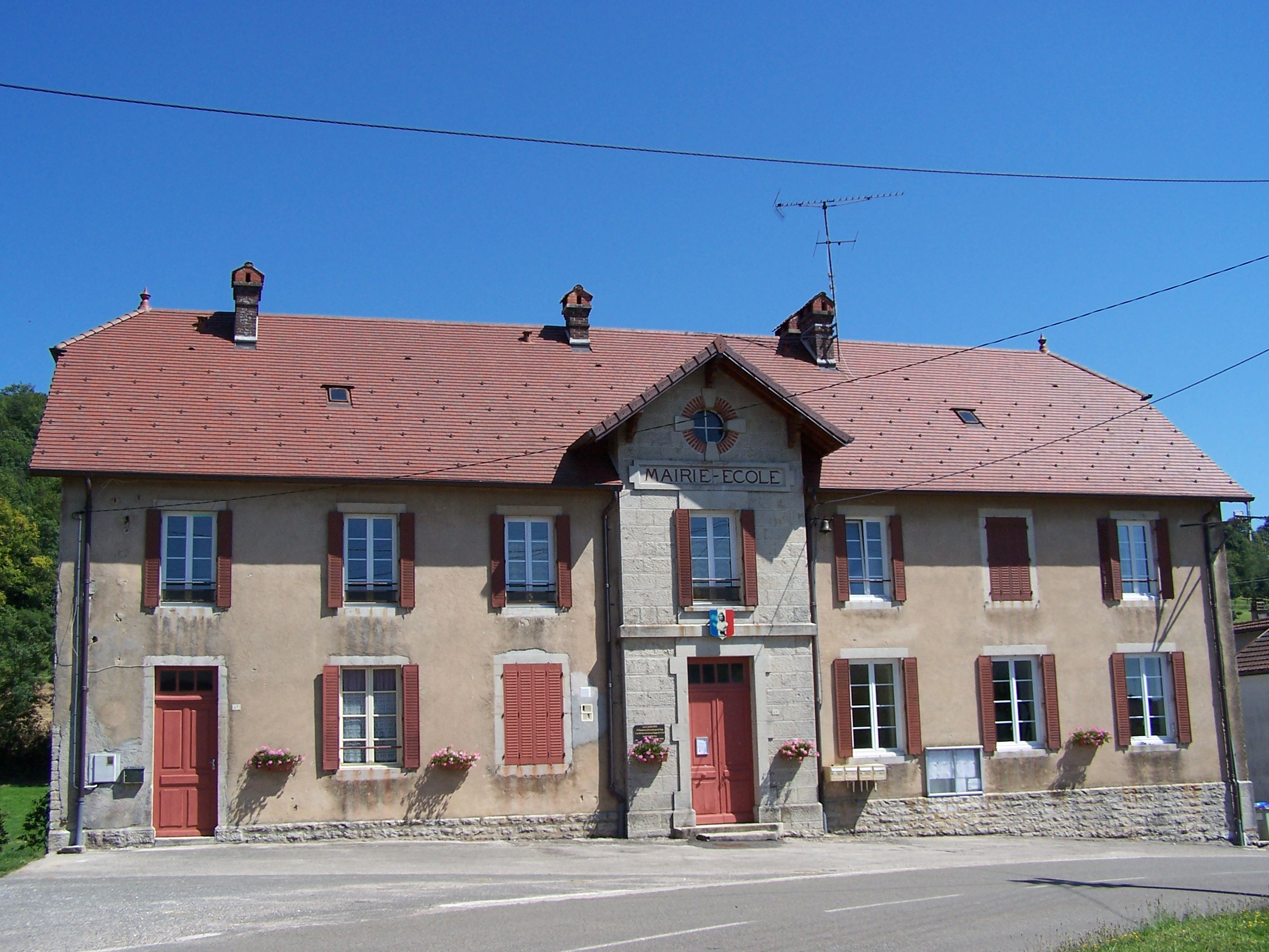 Photo de la mairie de Pimorin (Jura)